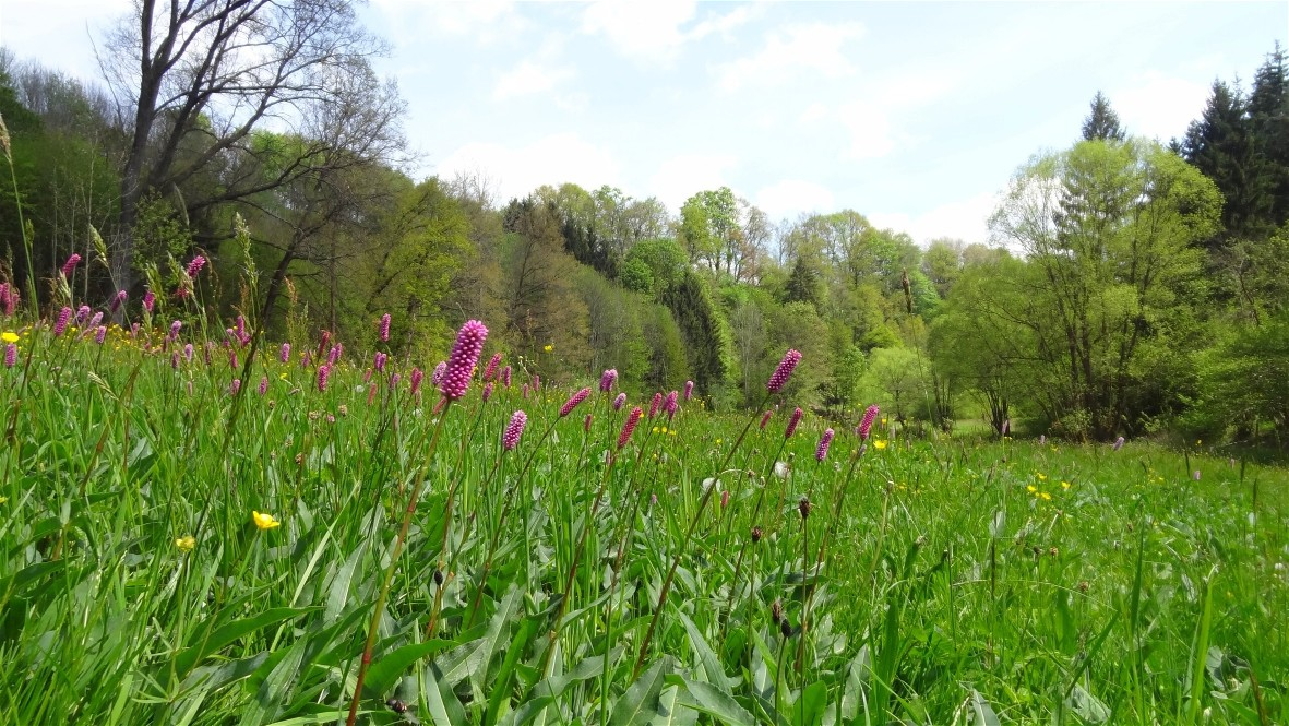 Wiese an der Zwettl, im Hintergrund Hangmischwald (Natura 2000-Gebiet)